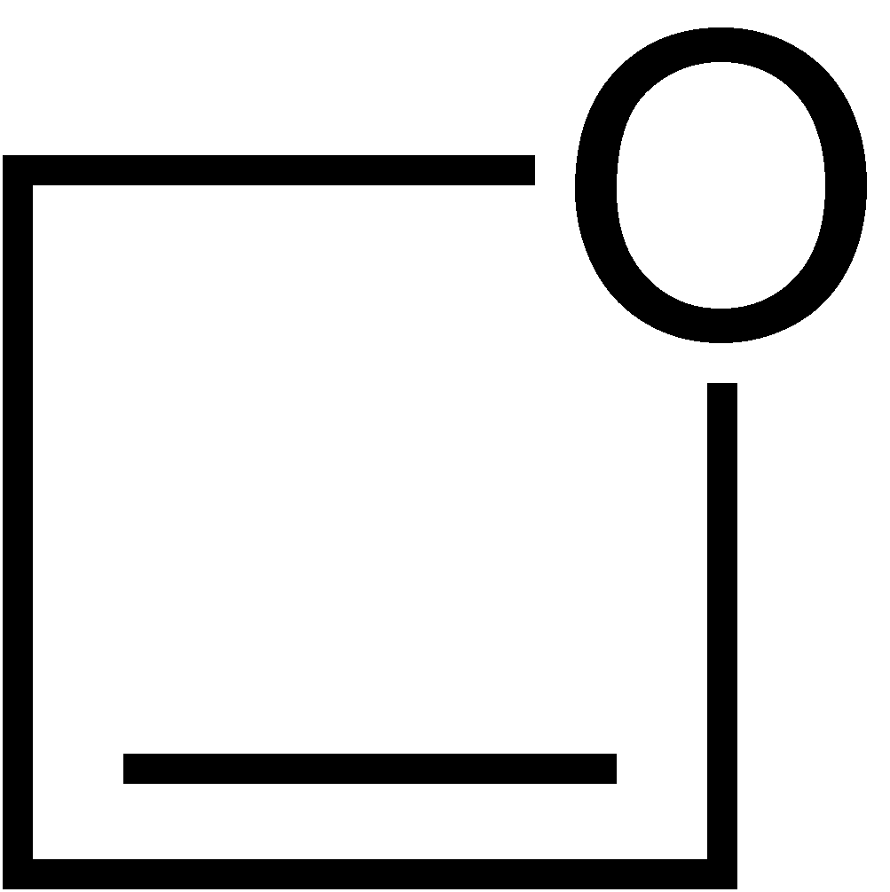 Struktur von Oxet